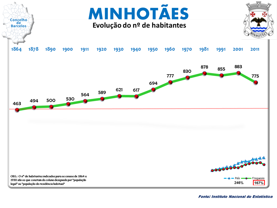 Cenos 1864/2011